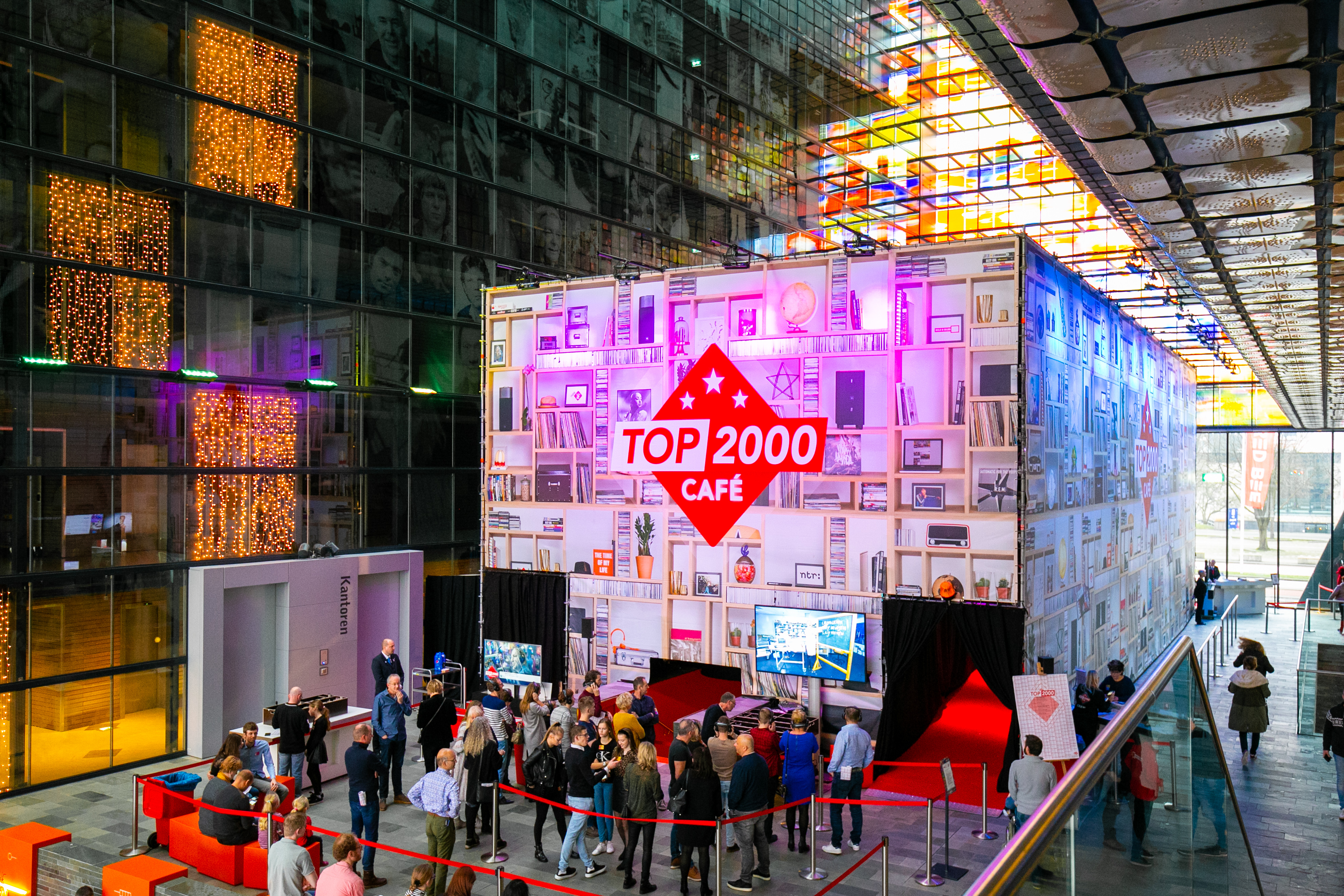 Buitenkant van het Top 2000 Café in het Beeld en Geluid museum te Hilversum